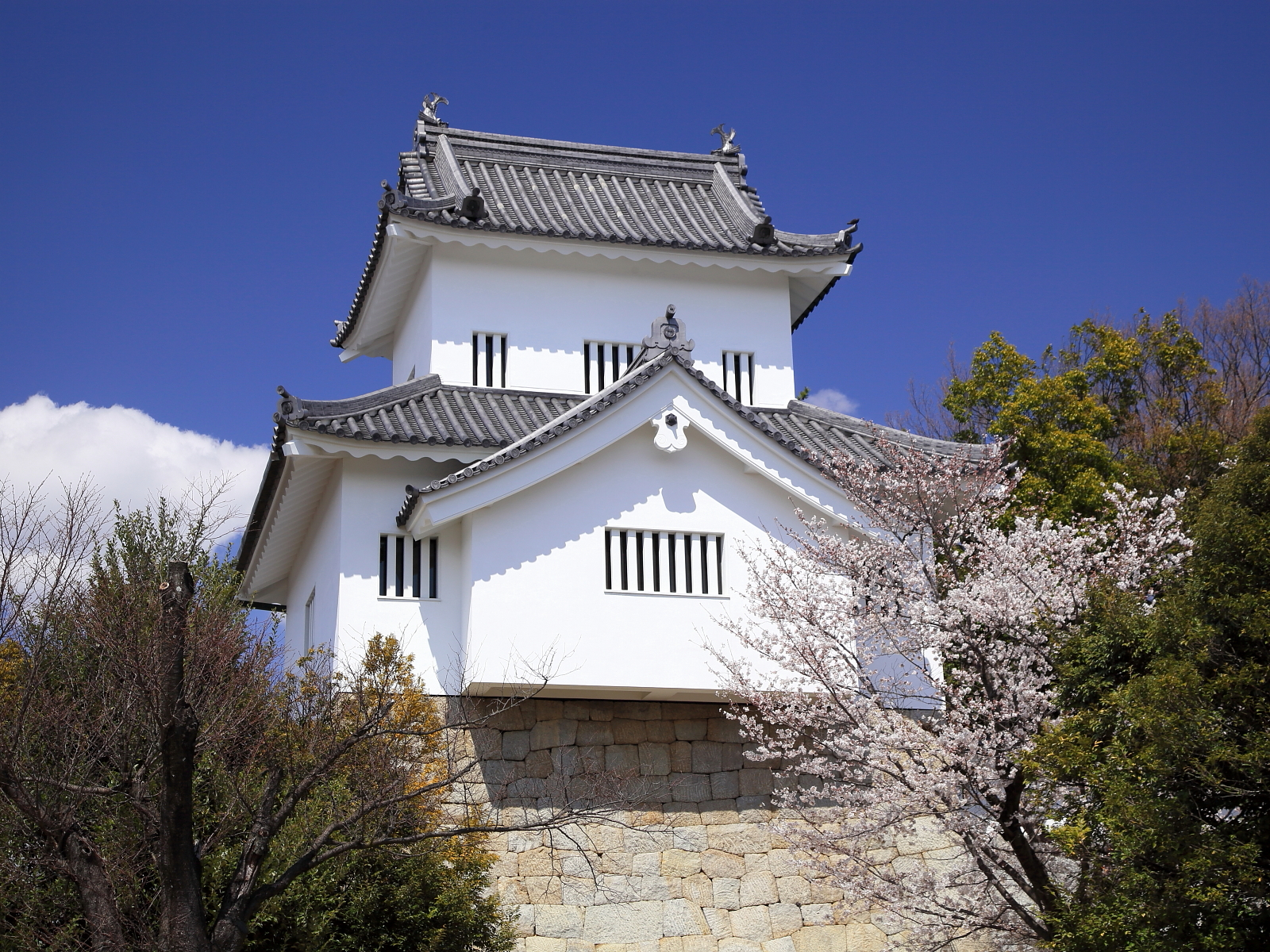 挙母城（七州城）復元隅櫓（豊田市小坂本町、2012年（平成24年）4月）